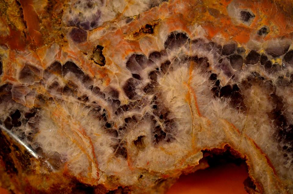 Přírůstkové zóny v odrůdě křemene ametystu.